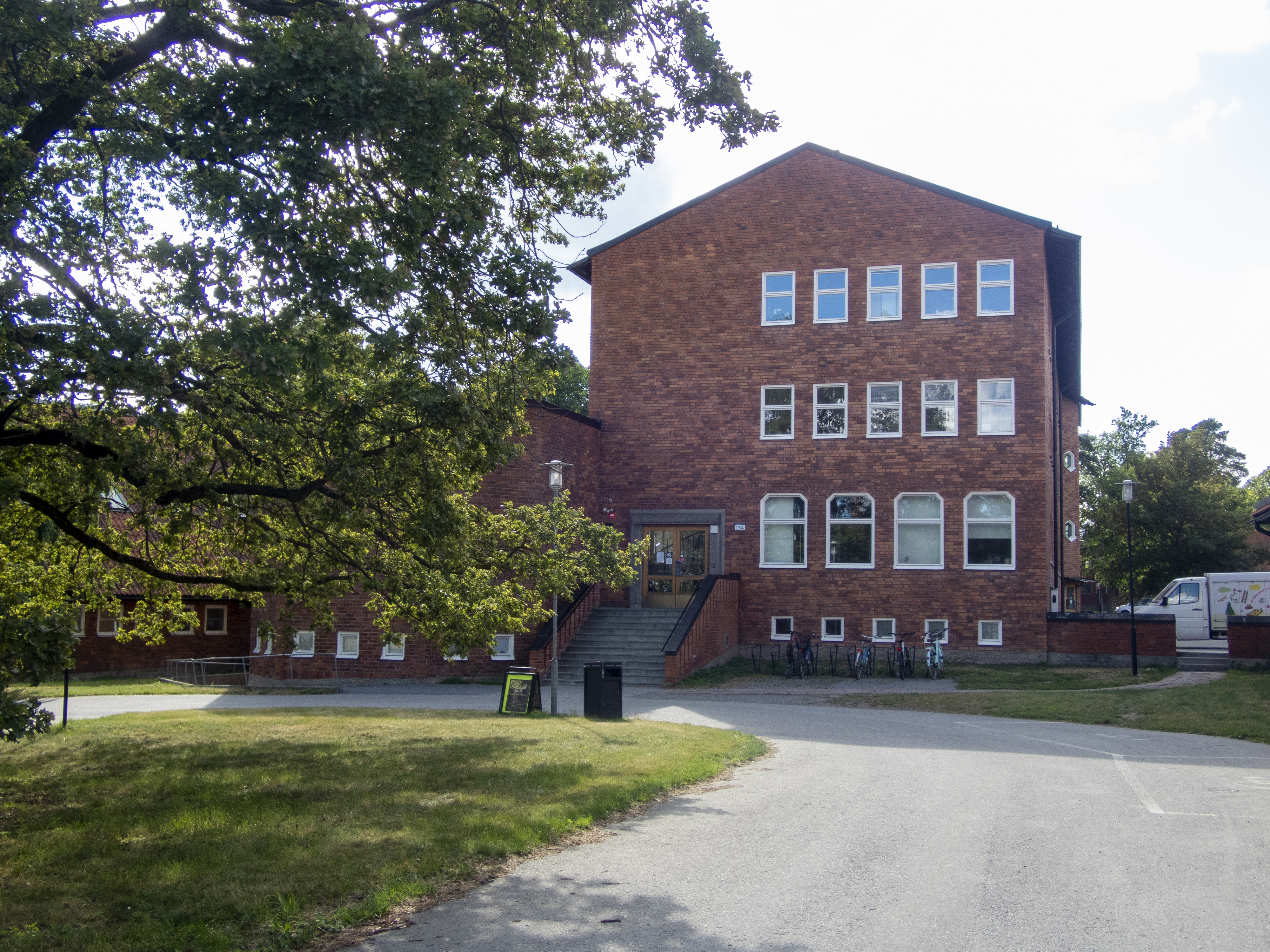 Veterinärhögskolan. Byggnad för Institutionen för obstetrik och gyneologi, uppförda 1942-45. Arkitekt Joel Lundeqvist